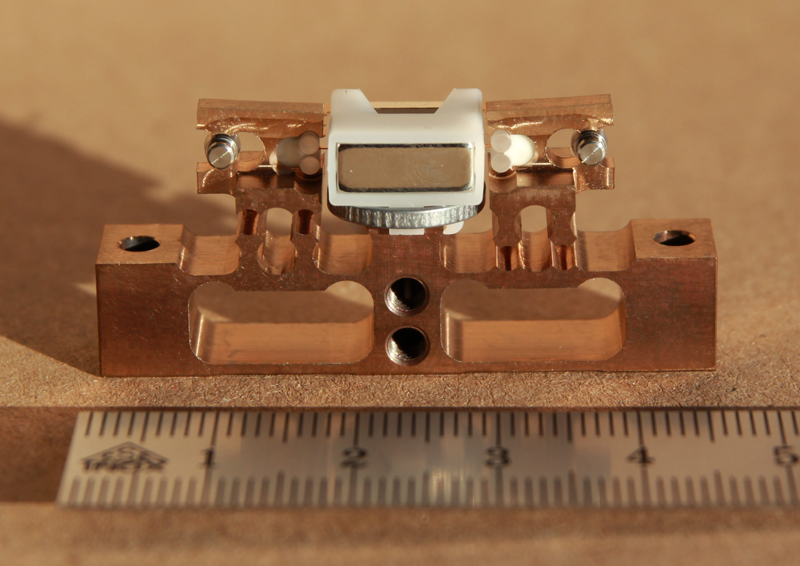 Schwingsaitenaufnehmer für hoch dynamische Anwendungen